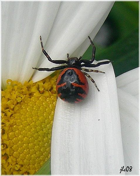 Araña Napoleón vermella, A Coruña - Synema globosum female